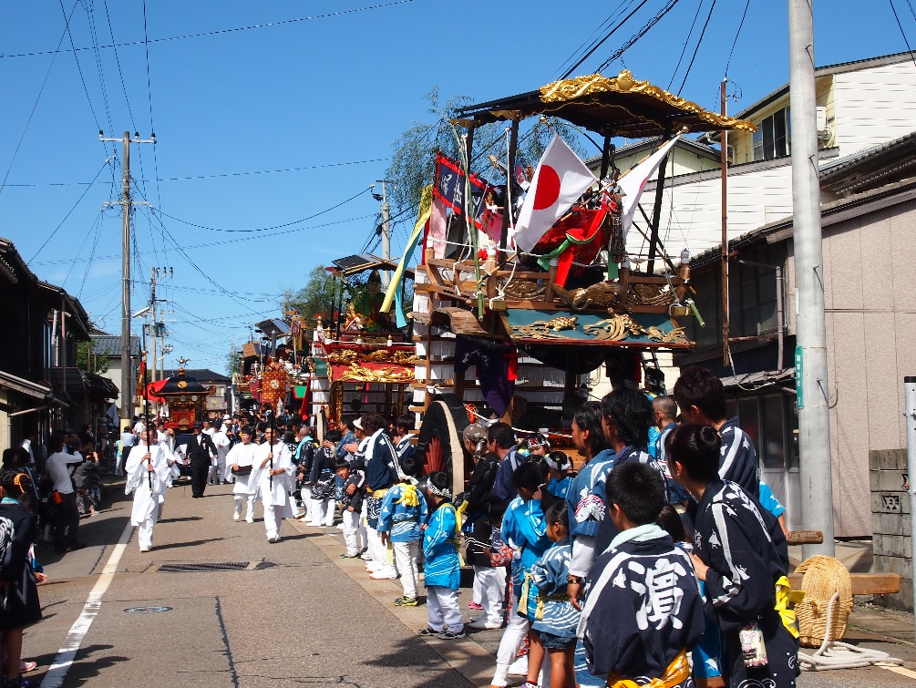 瀬波大祭2013